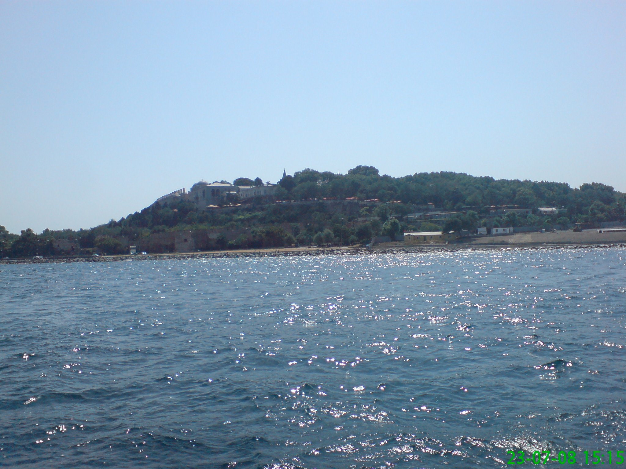 Topkapı Sarayı